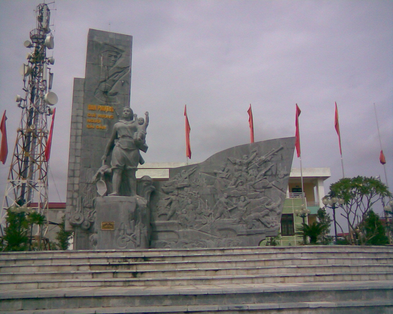 Người Phụ nữ Đan phượng